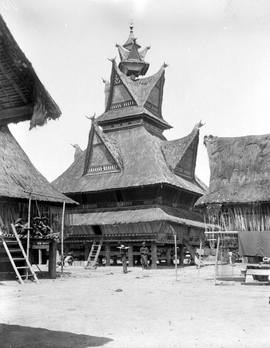 Negatief. Hoofdenhuis, Baroes Djahé, Karolanden.